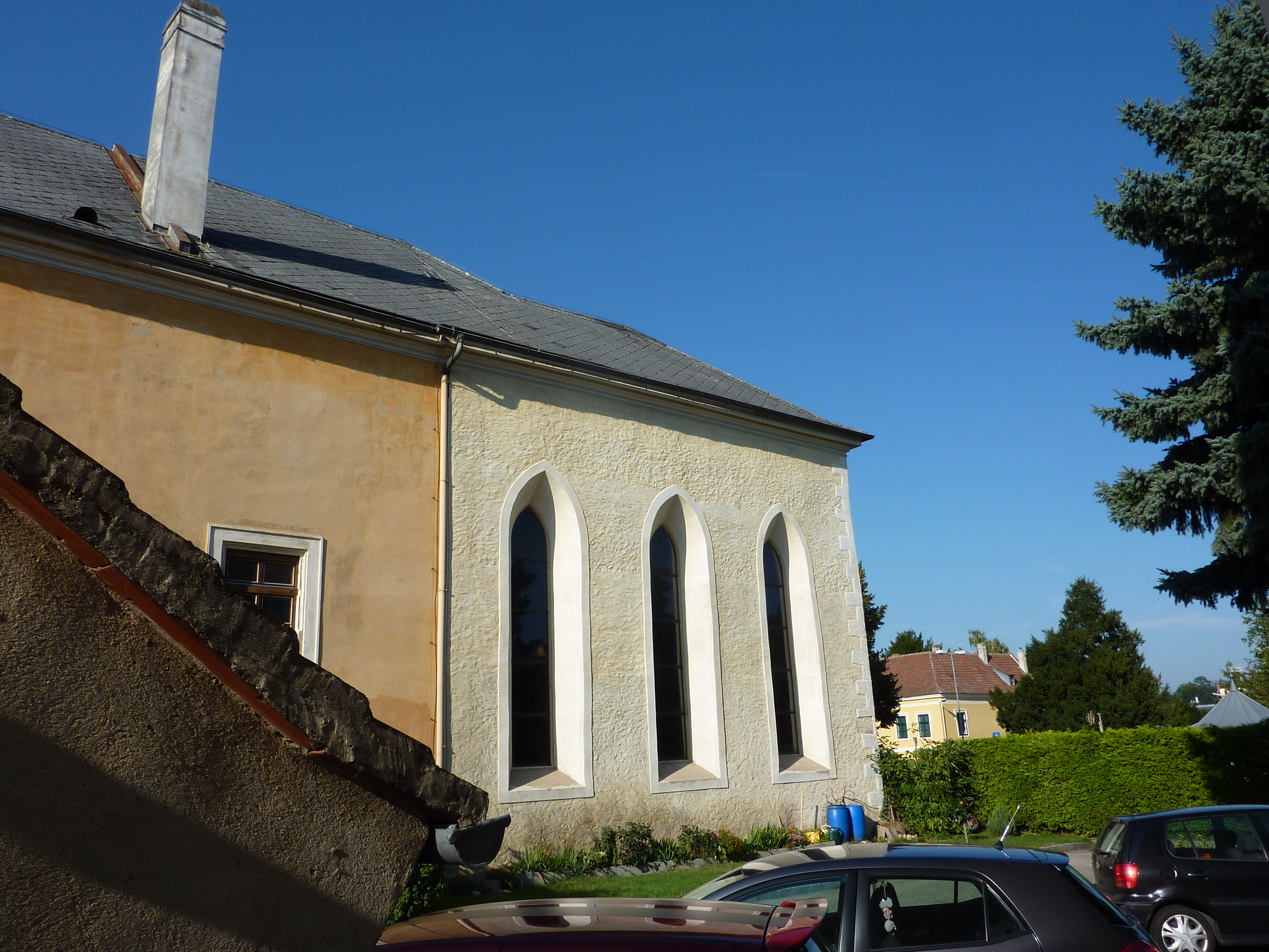 Ehem. Kapelle, Schloss, Mautern an der Donau in Niederösterreich